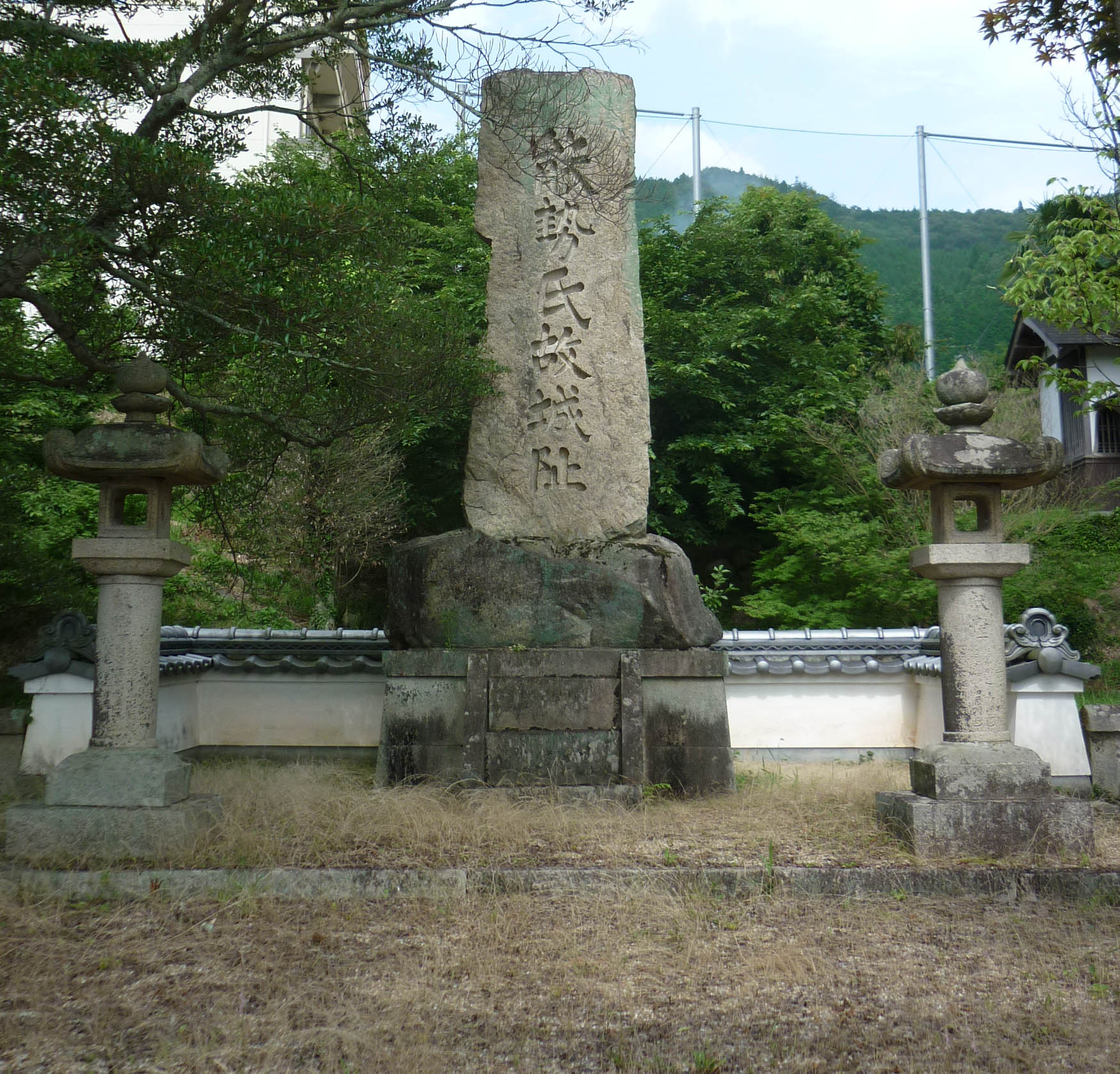 能勢氏故城址の石碑